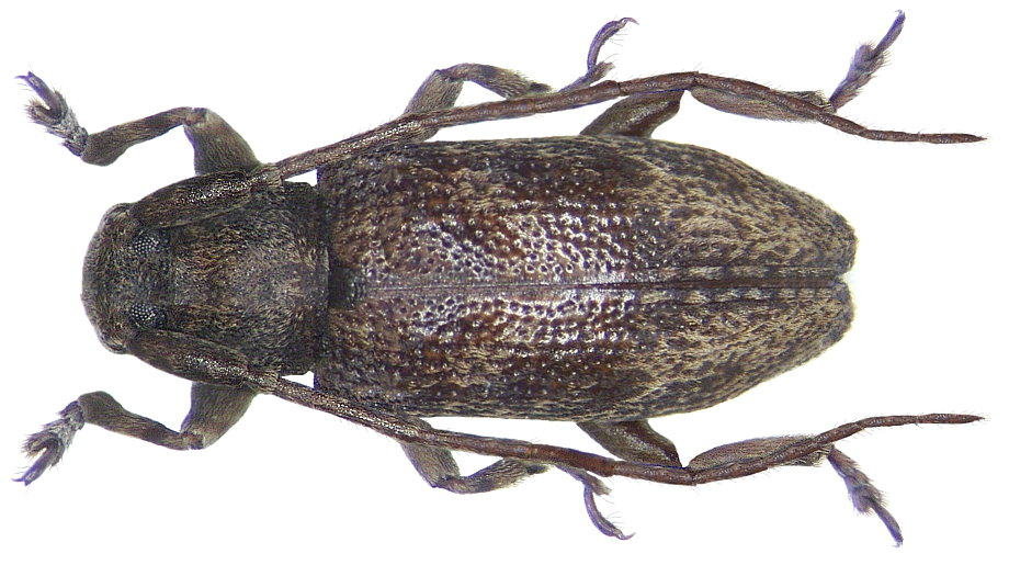 Familie: Cerambycidae Grösse: 6 mm Fundort: Indonesien, Irian Jaya, Ransiki leg. A.Skale, 2007; det. D.Telnov, 2008 Foto: U.Schmidt, 2008